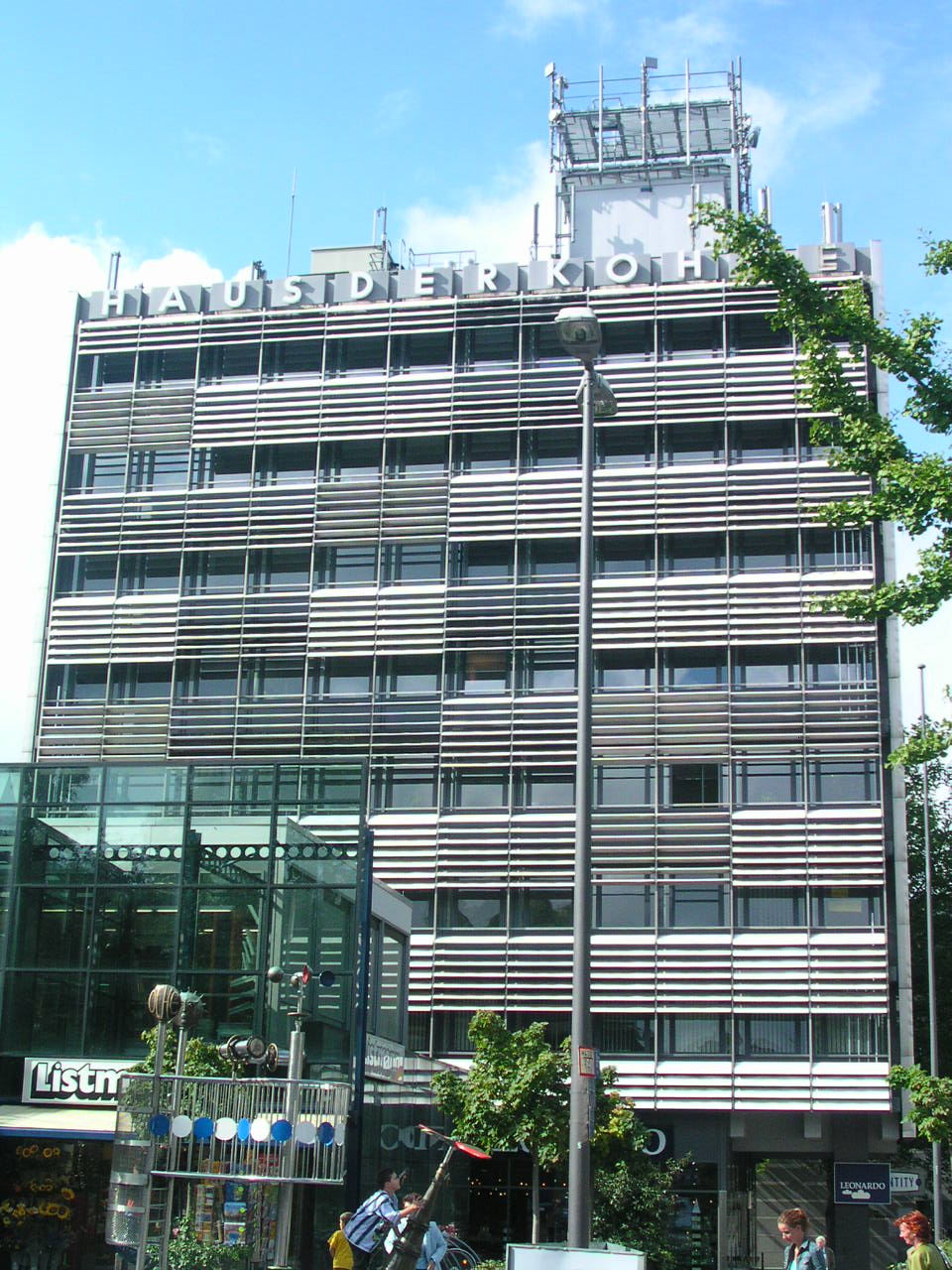 Aachen, "Haus der Kohle" an der Ursulinerstraße